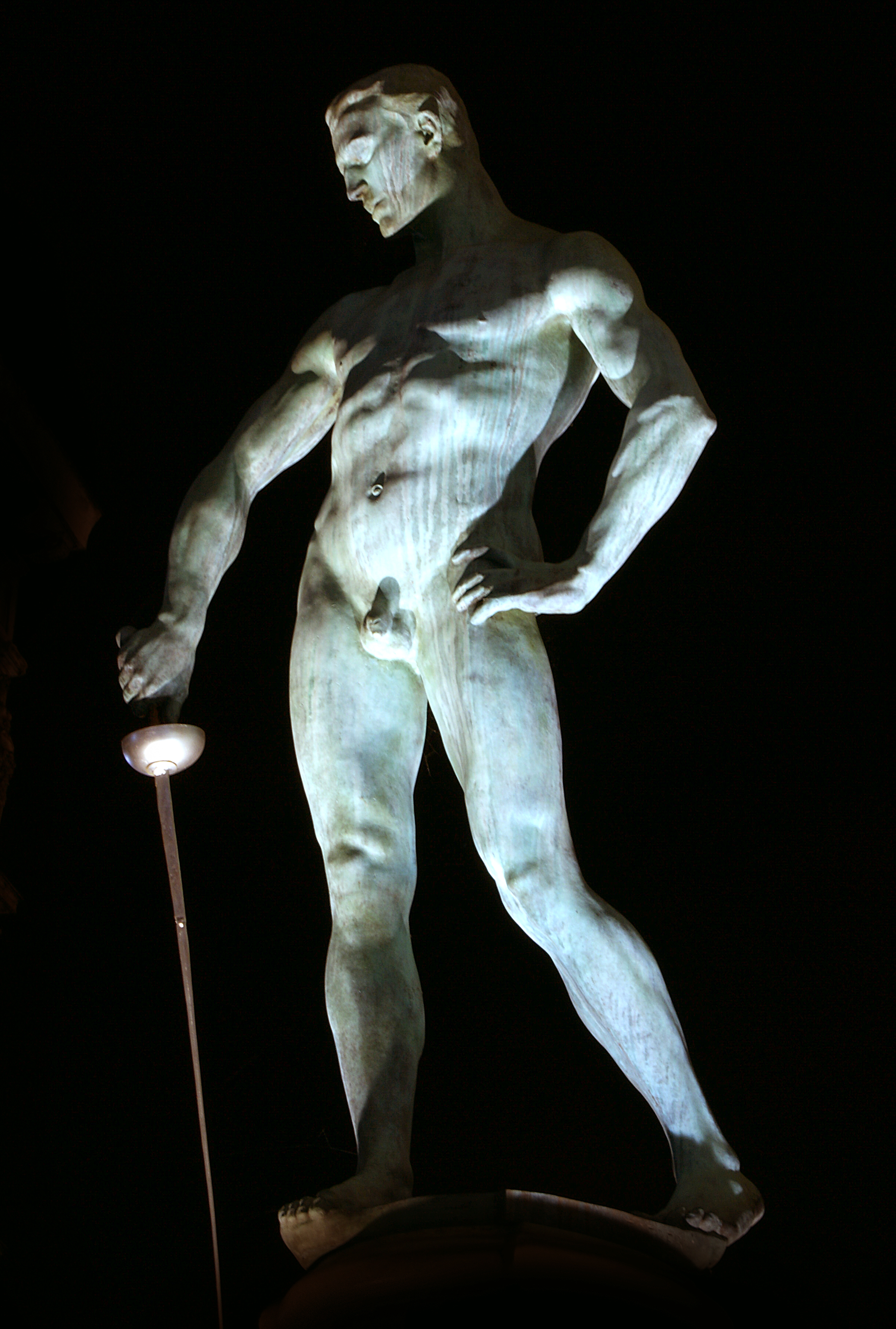 Fontanna z Szermierzem we Wrocławiu